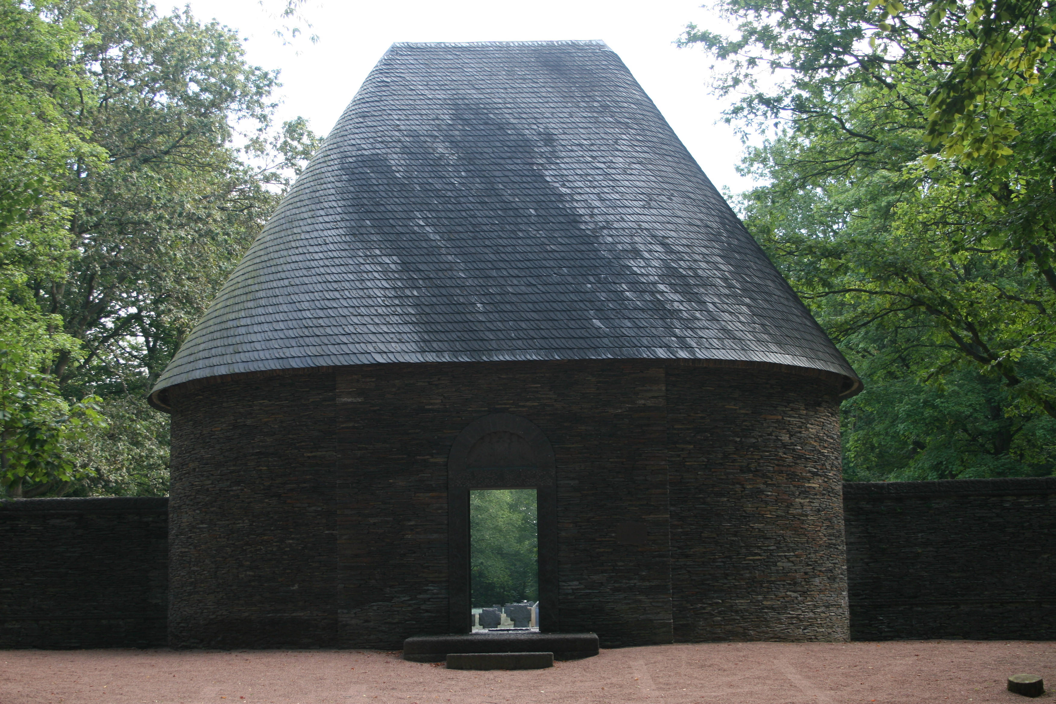 Ehrenfriedhof Bad Kreuznach, Eingangstor, Außenansicht